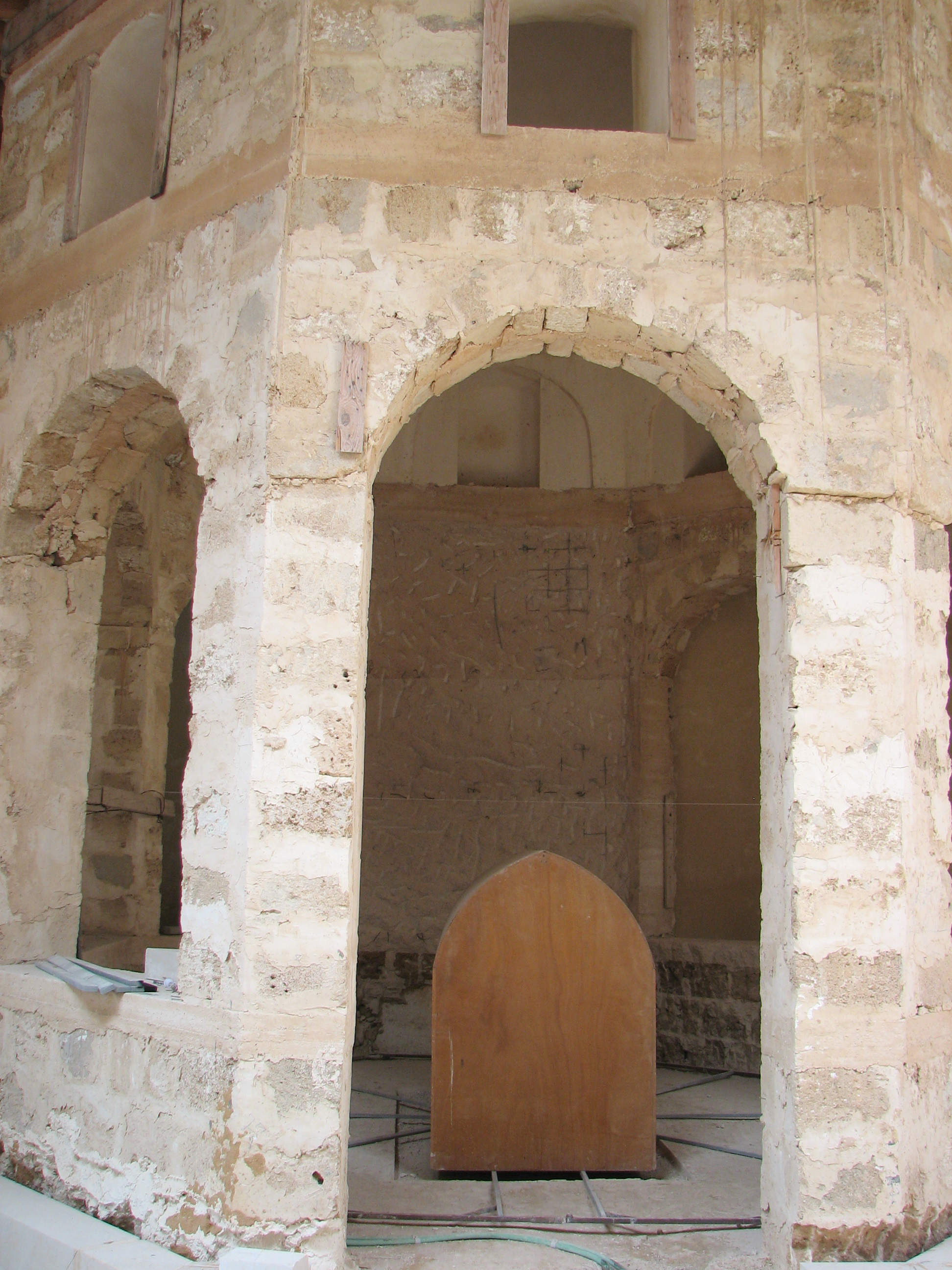 Akko, El Shazliya Mosque under construction. The cost of construction is estimate 80 M $ מסגד אל -שאזליה בעכו. מרכז השאזלים נמצא בלבנון. במשך שנים מרכז זה נזנח והשוכרים הרחיבו את בתיהם. השאזלים החליטו לשפץ אץ המקום הם פינו את הדיירים תוך מתן פיצויים והחלו בשיפוץ האתר הכולל מסגד מבנים וקברים. ההשקעה המוערכת במבנה באתר היא 80 מליון דולר This image was taken as part of the Elef Millim project trip to the Old City of Acco, which was held on Friday, 5th March 2010. To view all images uploaded as pary of the Elef Millim Project אזור קבורה מתוכנן